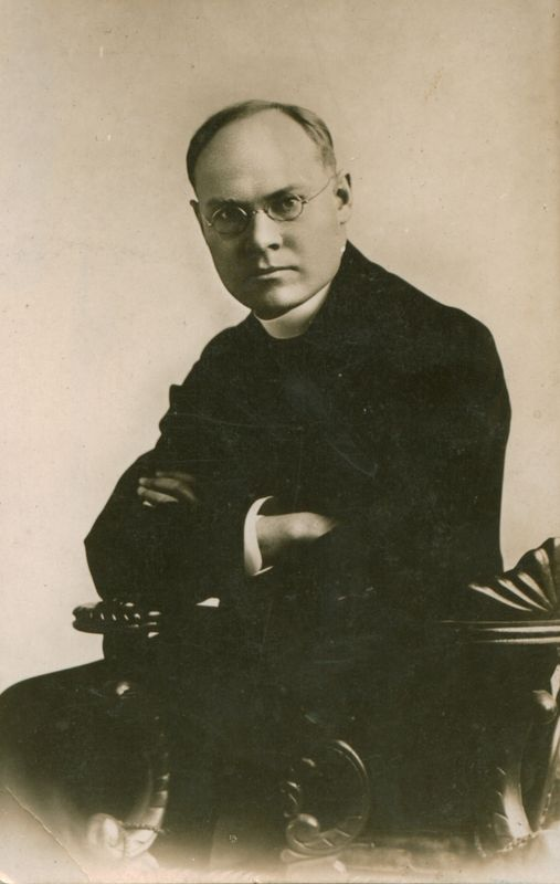 Motiejus Gustaitis